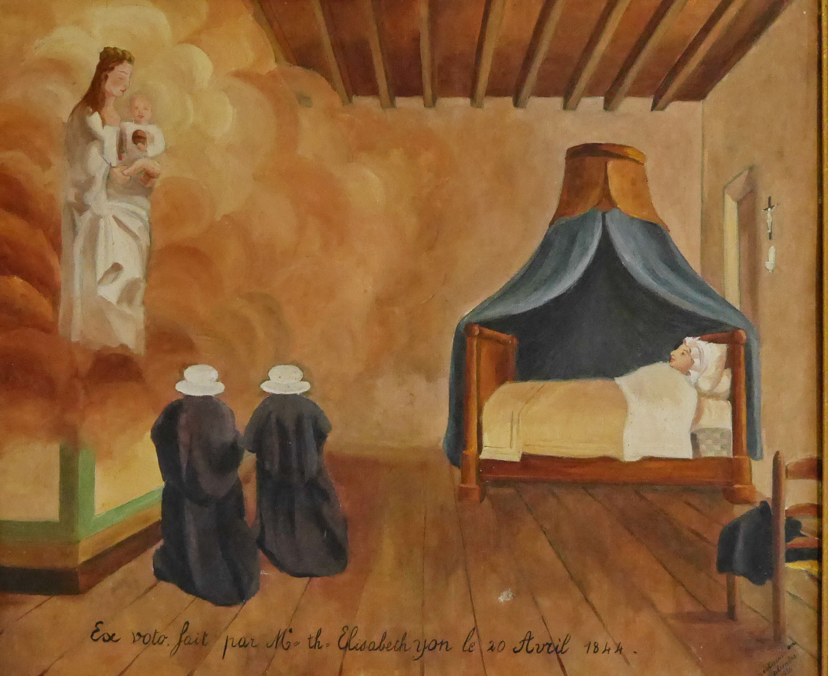 Ex voto-02-1844-Elisabeth Yon